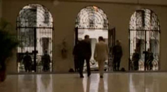 Minuto 21 filmado en CR de película 100 Días en la jungla (100 Days in the Lungle by director Sturla Gunnarsson)